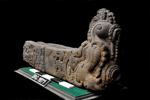 jaladwara saluran air purbakala